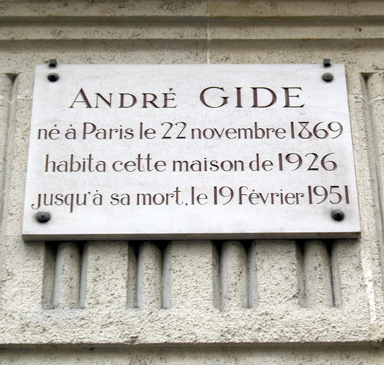 Plaque apposée au n° 1 bis de la rue Vaneau, Paris 7e. « André Gide, né à Paris le 22 novembre 1869, habita cette maison de 1926 jusqu'à sa mort, le 19 février 1951. »